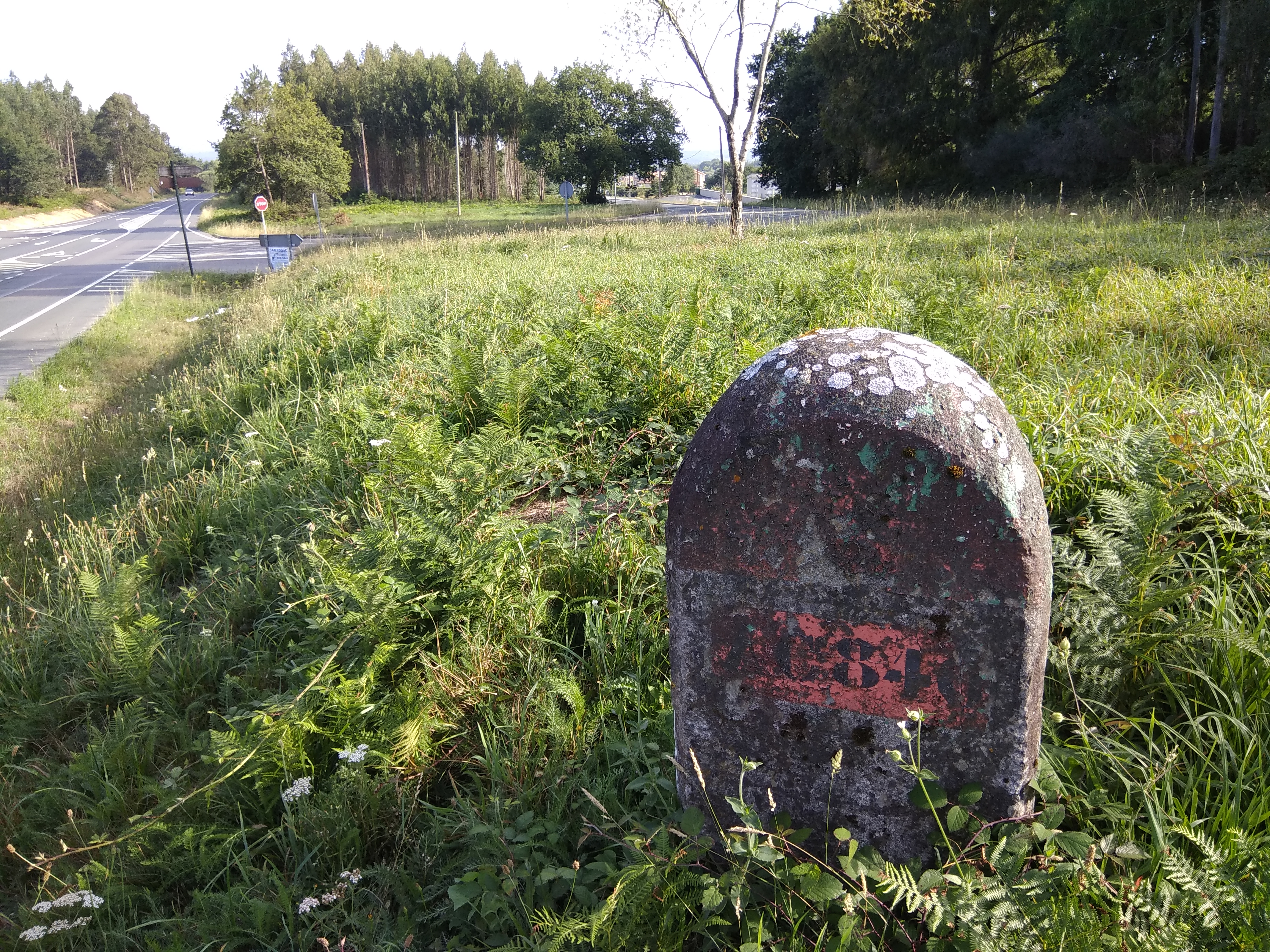 Baliza kilométrica do Plan Peña de 1939 na AC-840, en Vilasantar, Galiza.